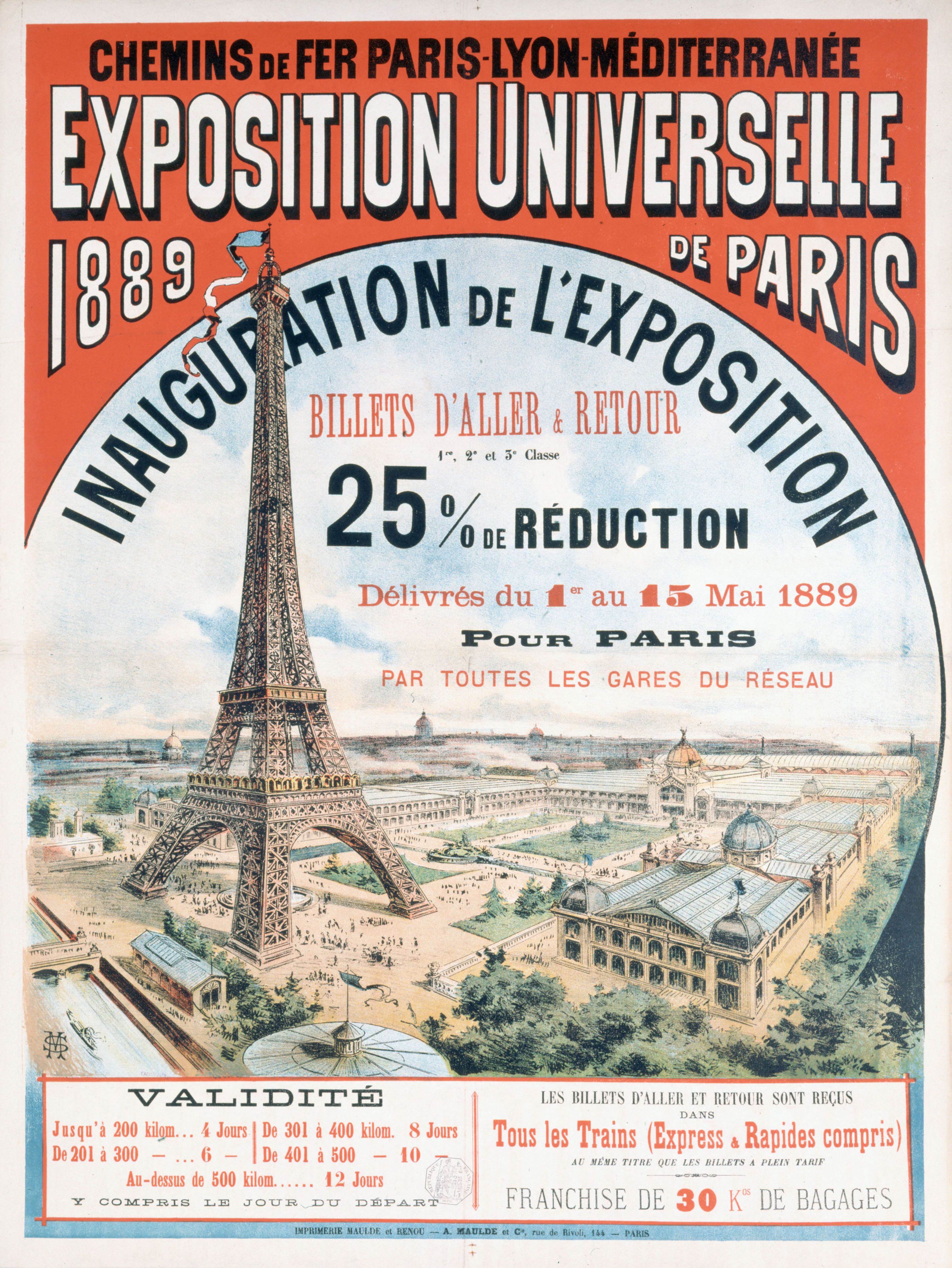 Affisch för världsutställningen i Paris 1889